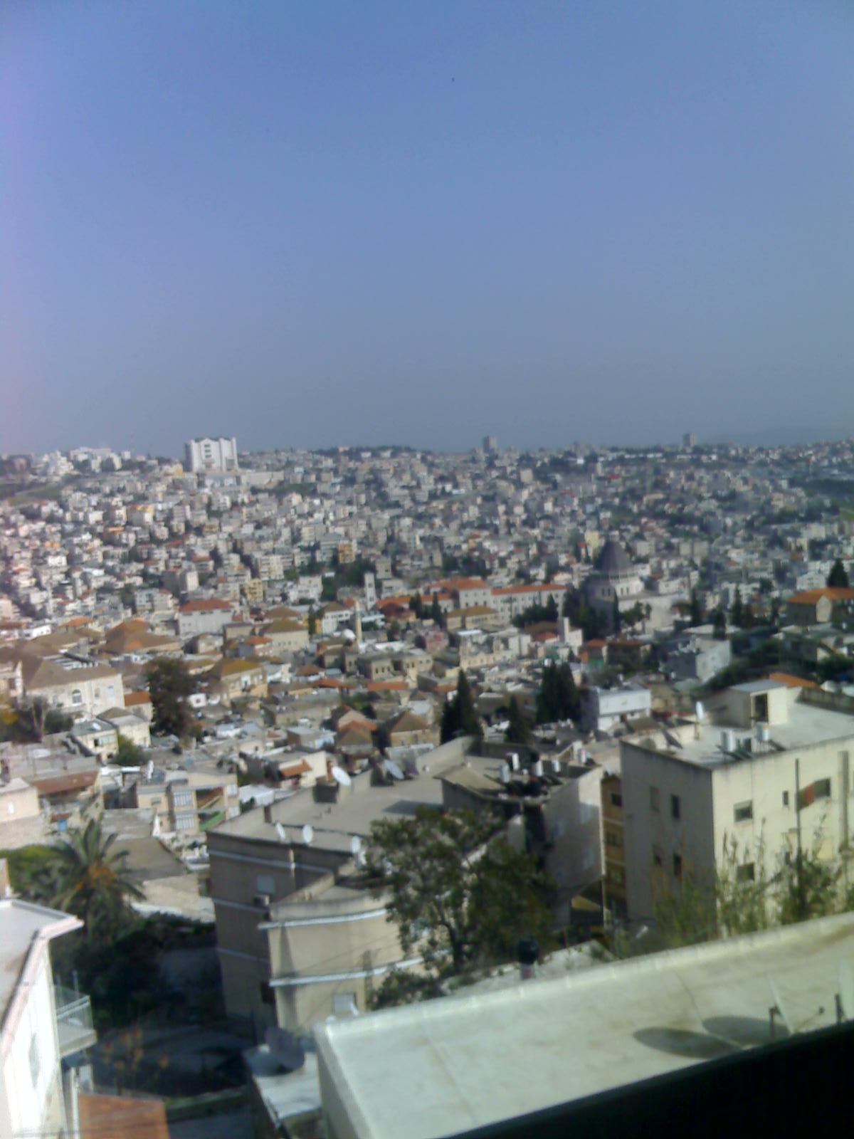 Nazareth